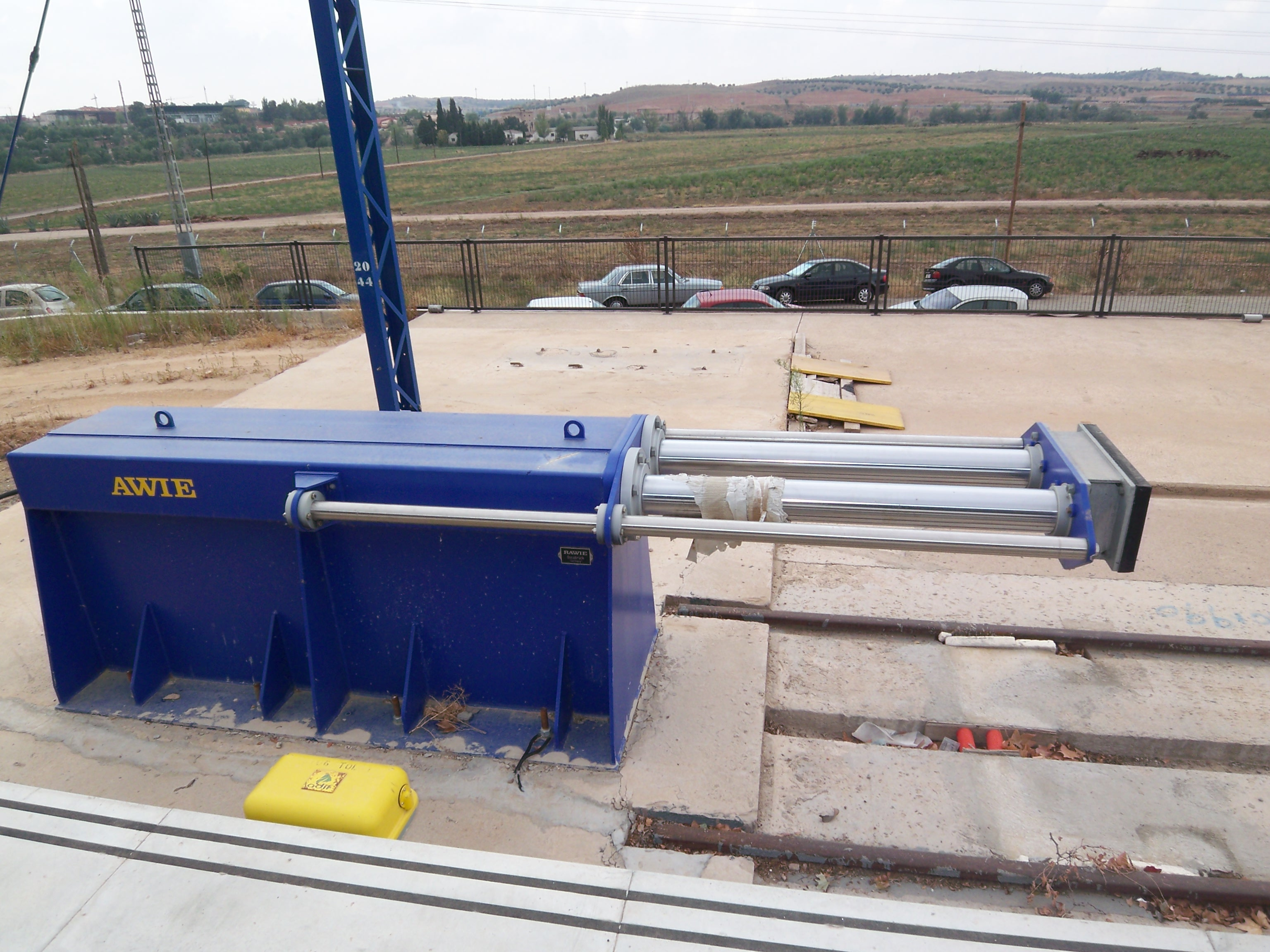 Prellbock im Bahnhof von Toledo